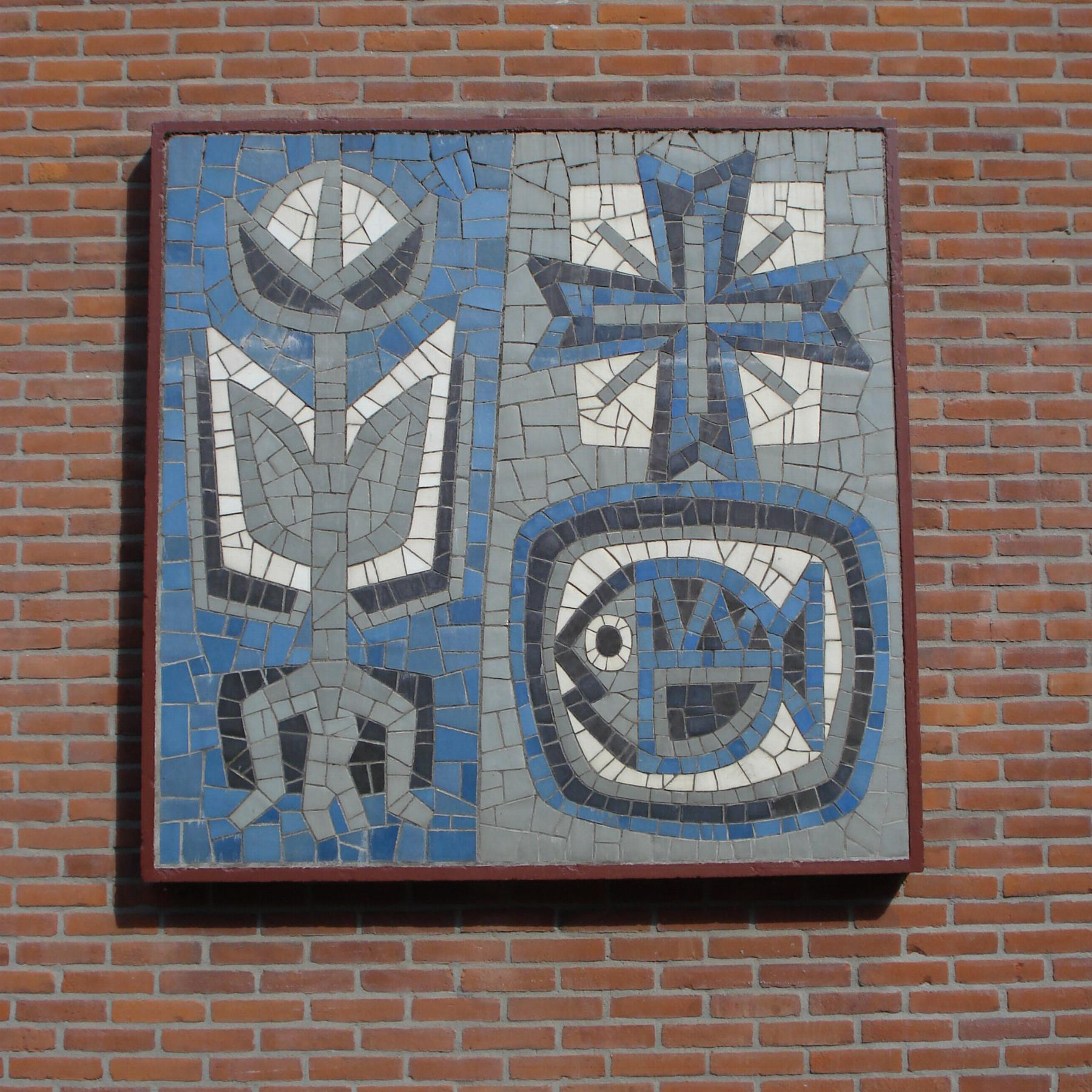 Dordrecht, Strijsingel 441. Relief zonder titel van Philip Kouwen. Dordrecht/The Netherlands. FOP.